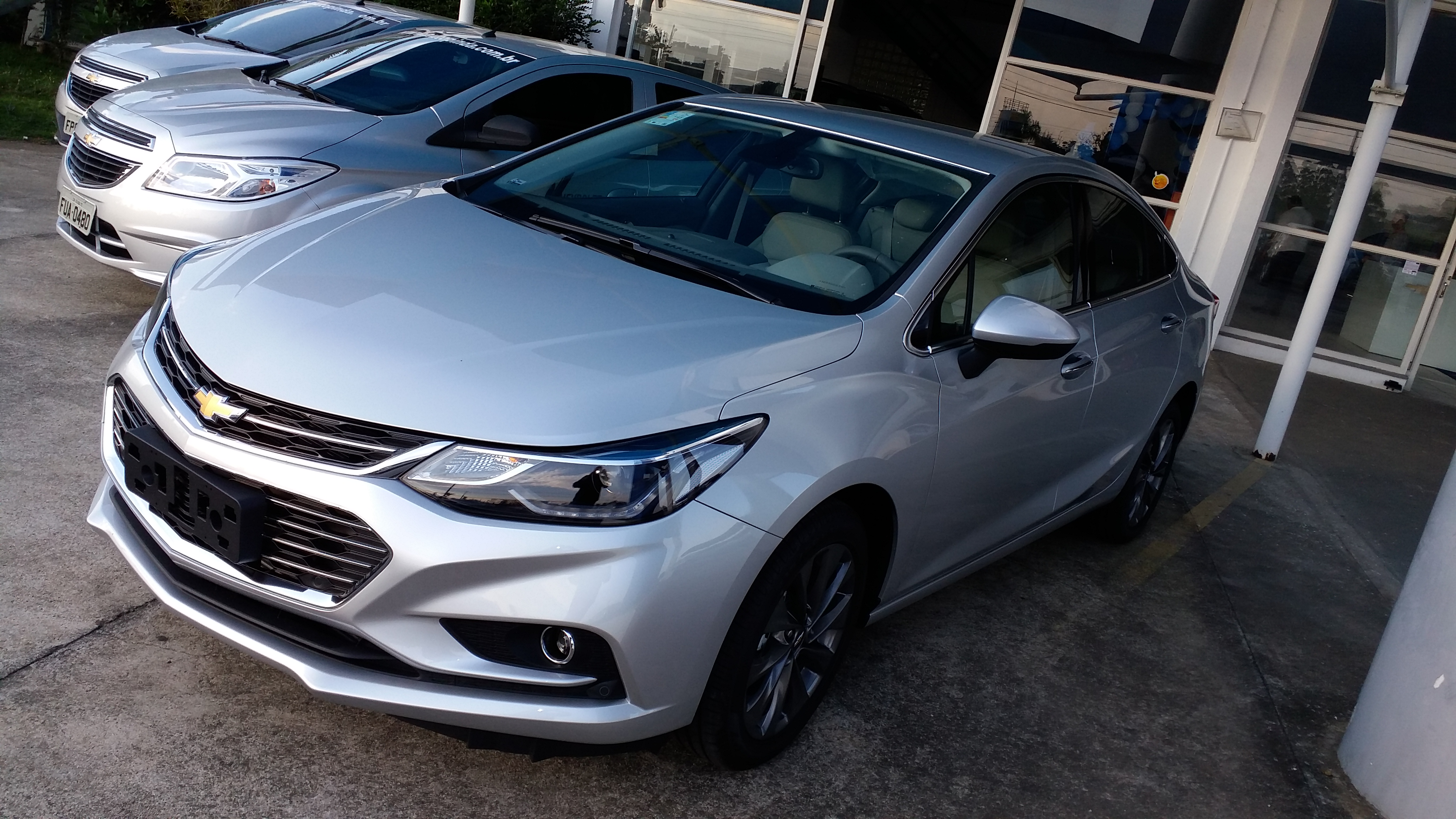 2016 chevrolet cruze 1ltz (Brazil)